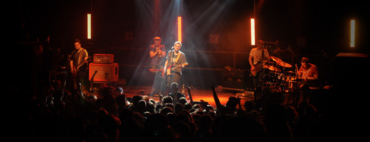 Zespół happysad podczas koncertu w łódzkim klubie Dekompresja.